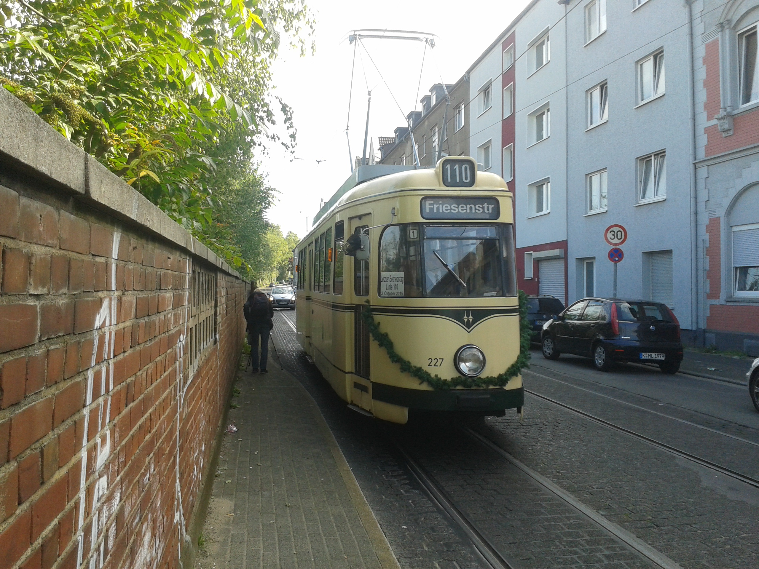 Der historische Großraum-Triebwagen 227 der Mülheimer Straßenbahn erreicht als Zusatzwagen auf der Linie 110 an ihrem letzten Betriebstag die Haltestelle Meißelstraße in Styrum